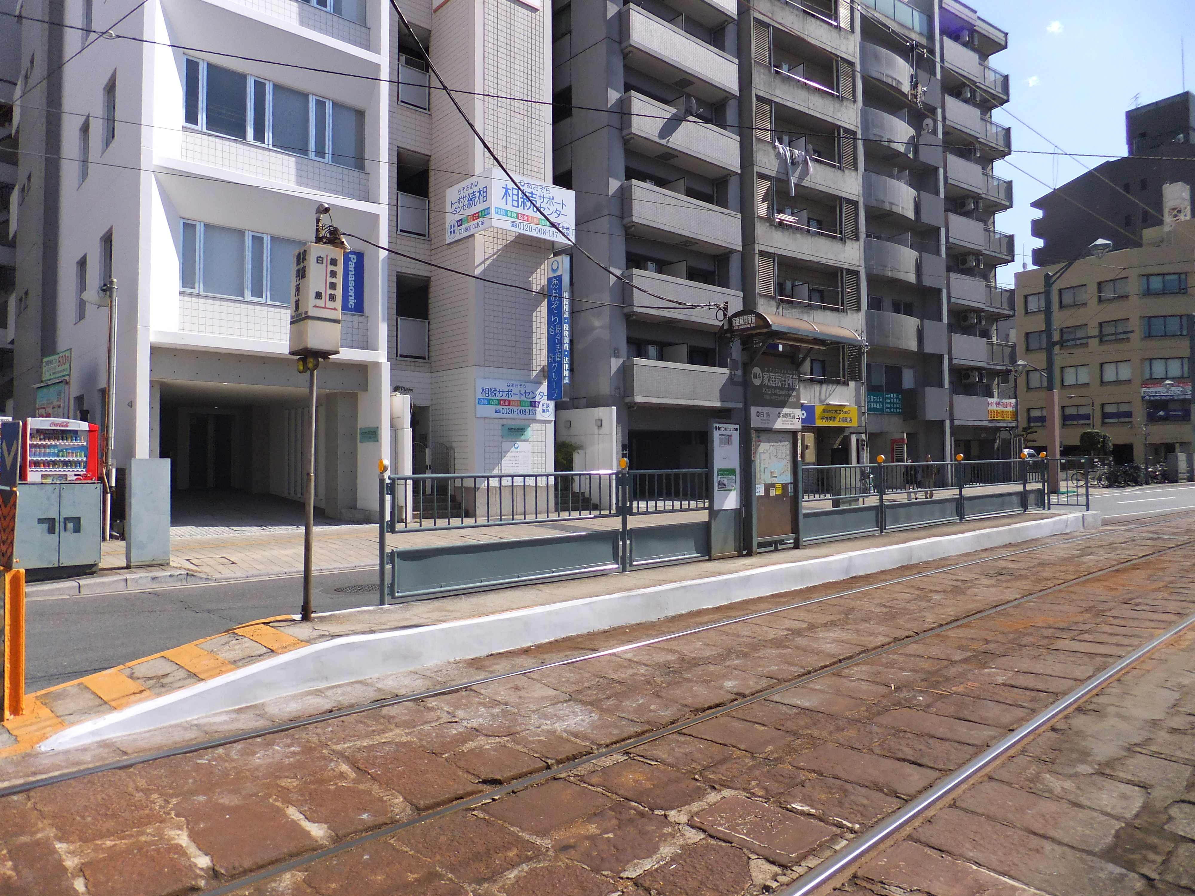 広島電鉄家庭裁判所前電停（八丁堀側）